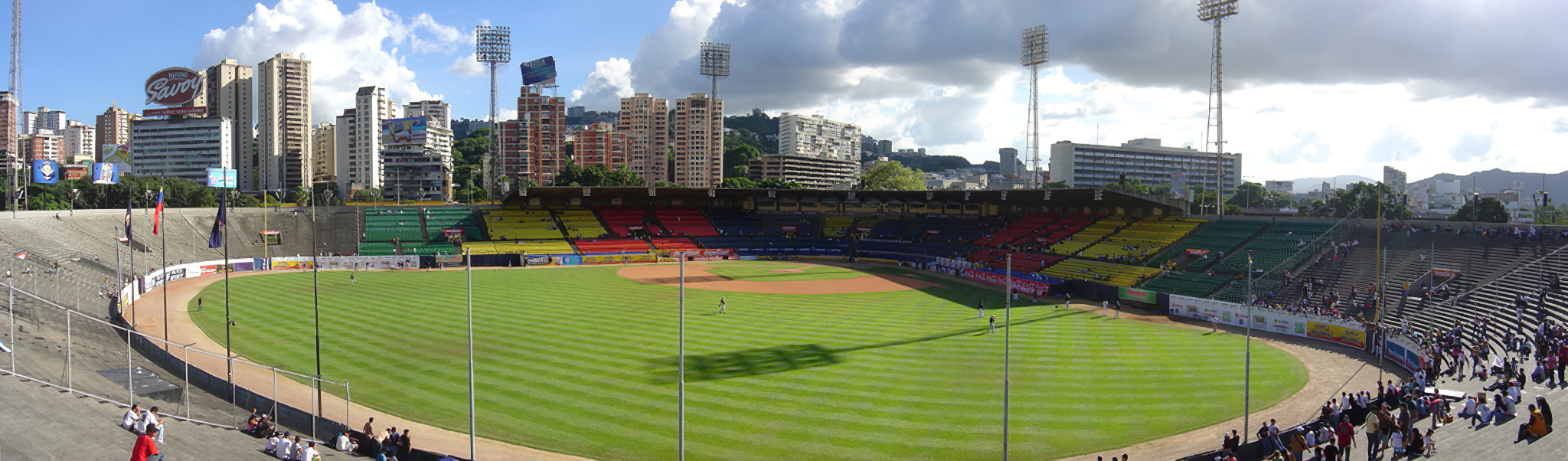 Estadio Universitario de la UCV , Caracas,Venezuela